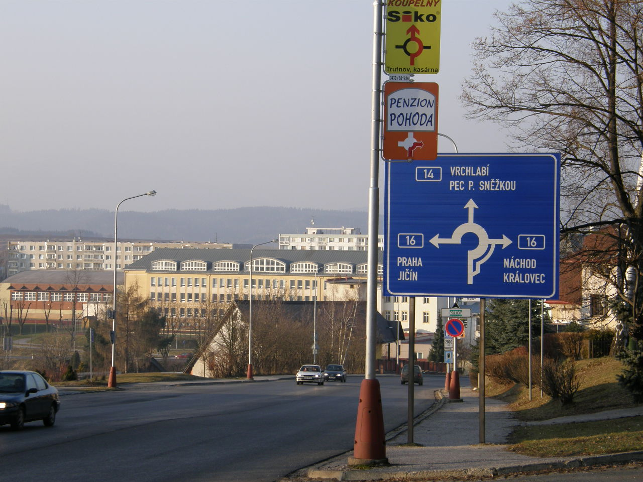 Droga krajowa 37 (Czechy) /Trutnov